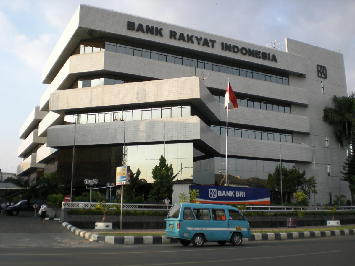 Bank Rakyat Indonesia branch in Makassar